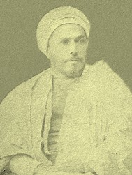 Salem Bouhageb